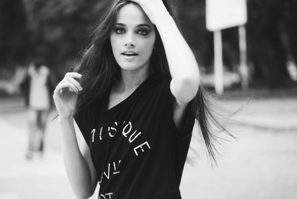 Fotografía de la cantante y actriz argentina Oriana Sabatini